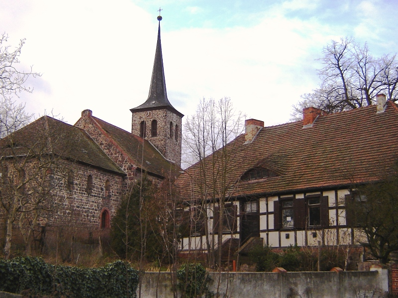 Kirche und Pfarrhaus in Parchen, Sachsen-Anhalt